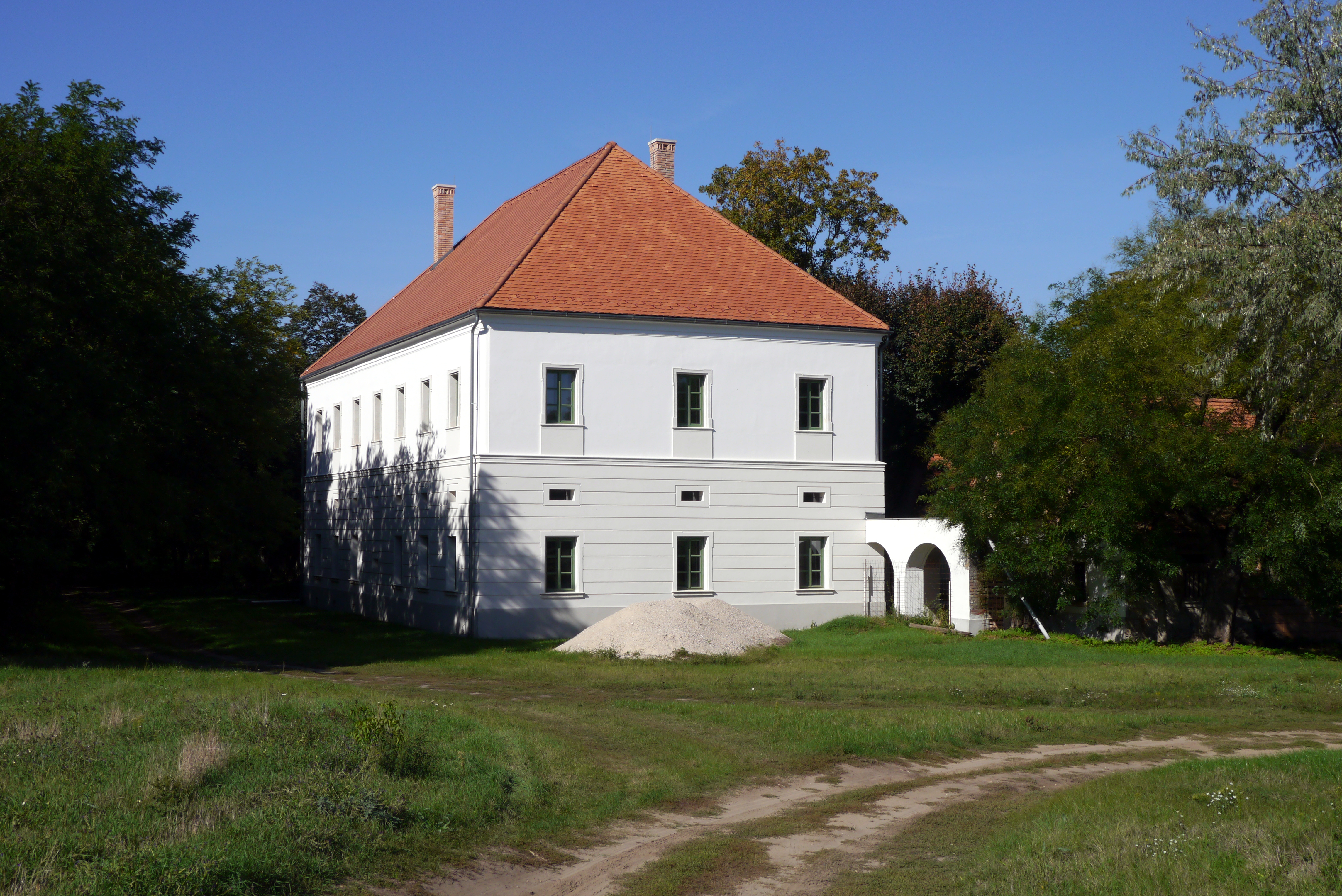 billegpusztai Esterházy-kúria. Építtette az Esterházy család a 18. század közepén (építész: Fellner Jakab). Műemlék ID 6338 Komárom-Esztergom megye, Naszály, Billegpuszta This is a photo of a monument in Hungary. Identifier: 6338